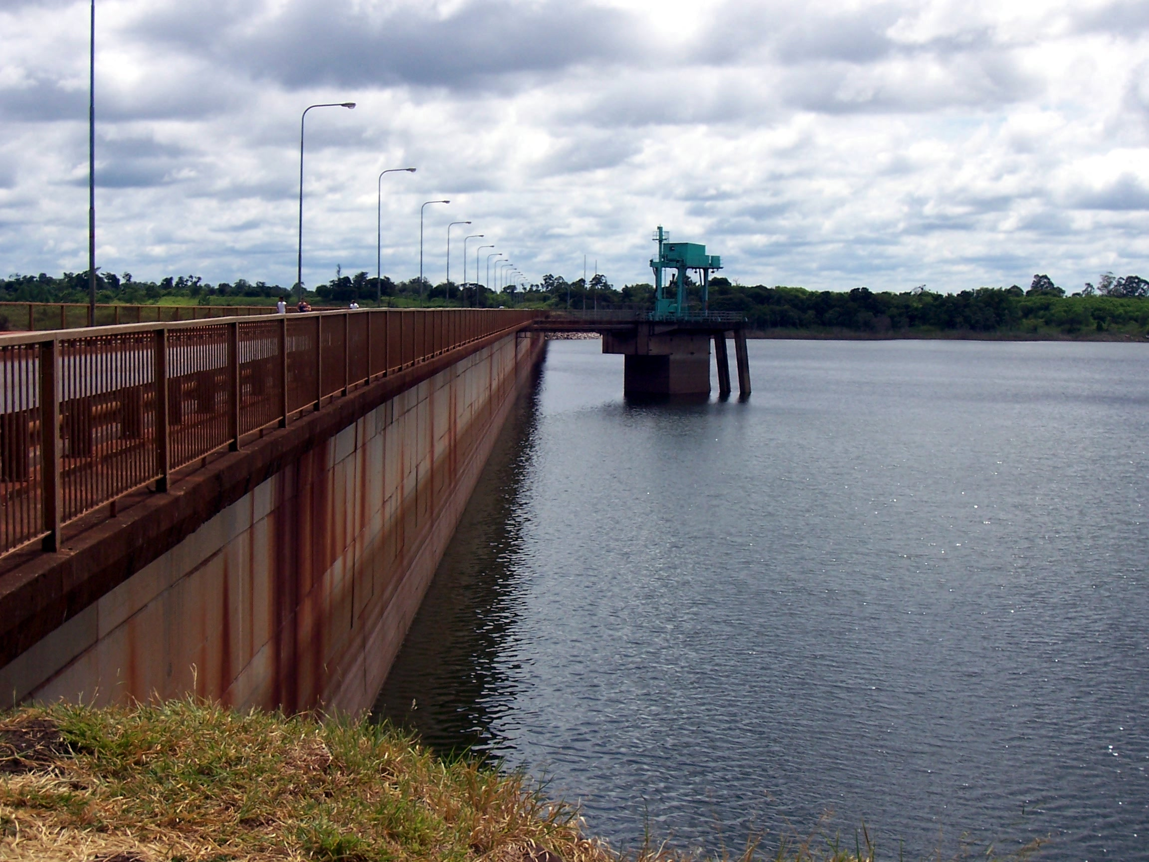 Vista de la Represa Hidroeléctrica de Urugua-í en la provincia de Misiones (Argentina).